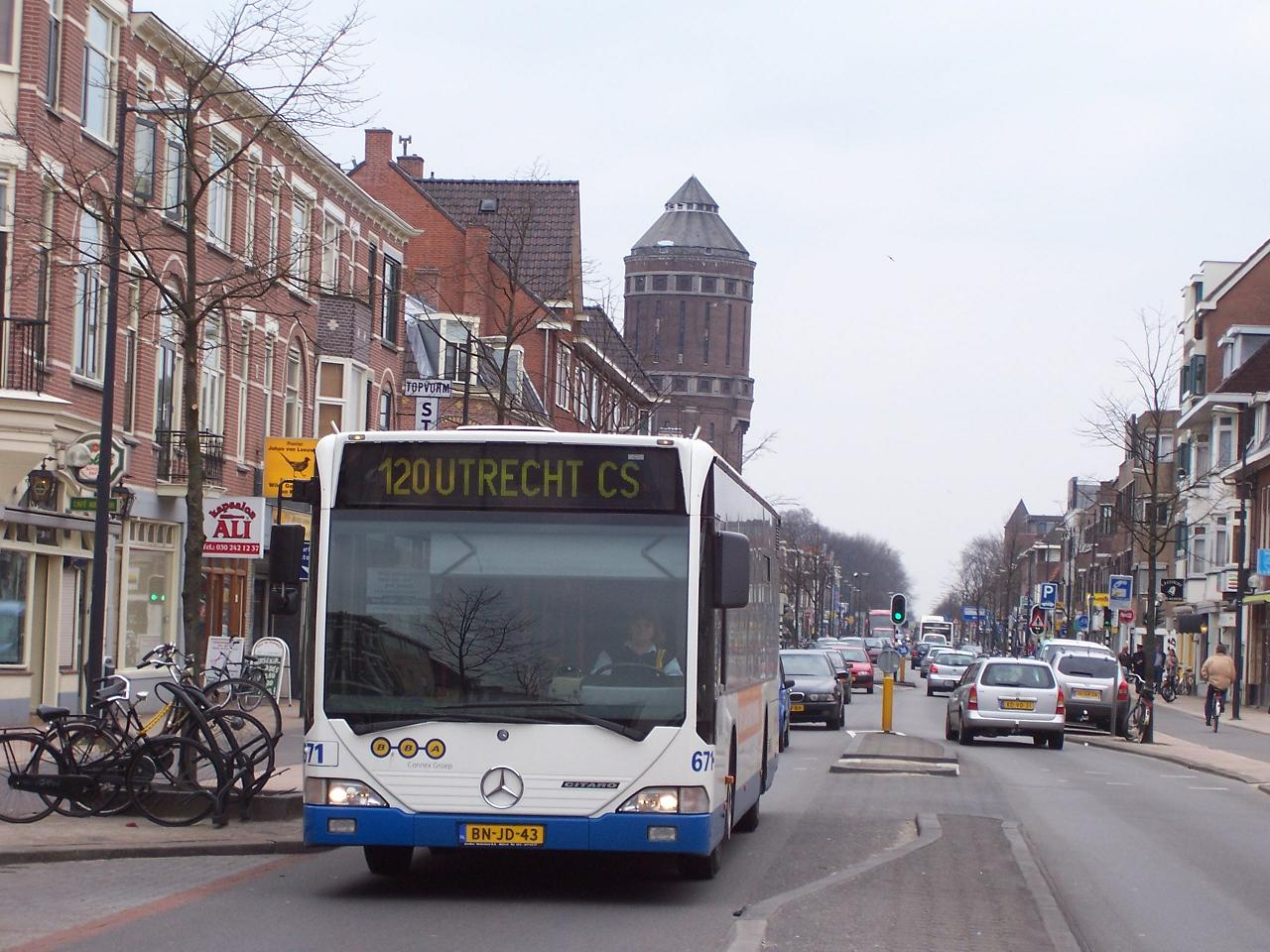 Publicatie met naamsvermelding Maurits90